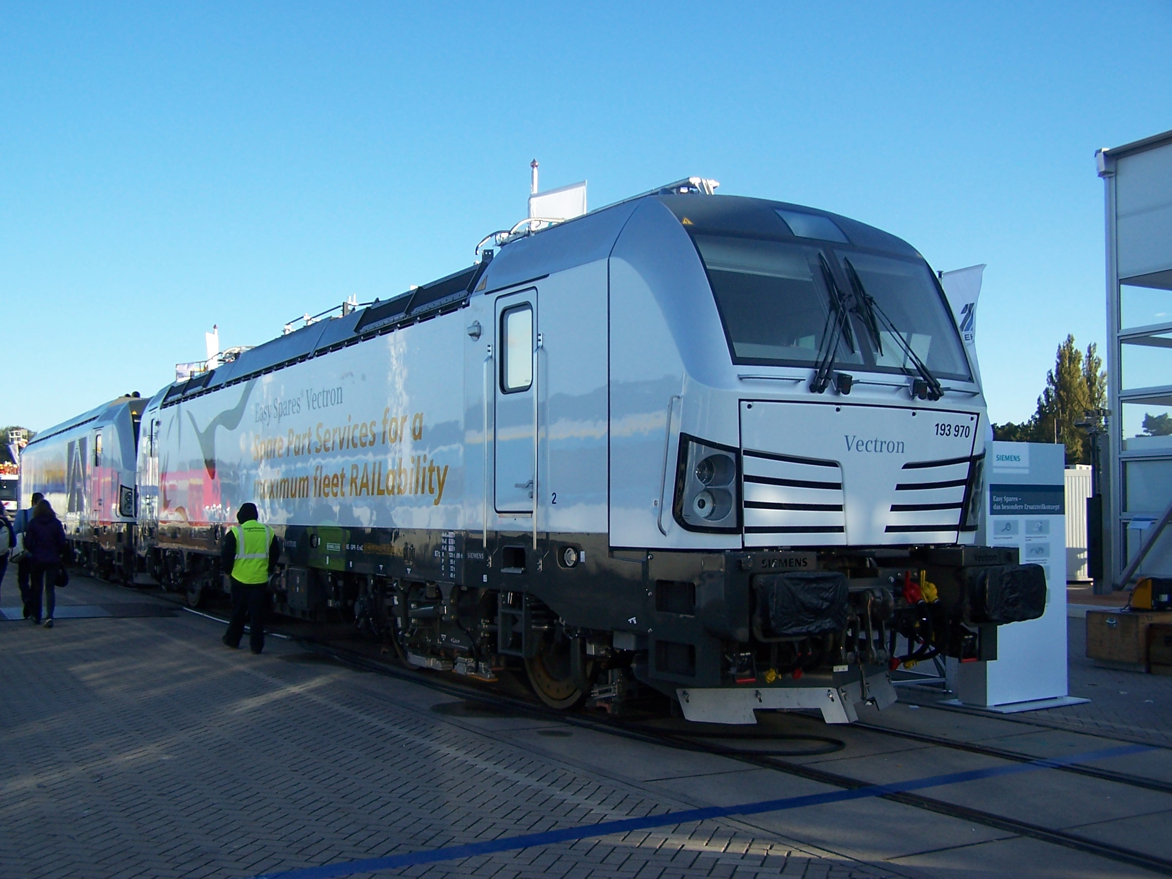 Siemens Vectron 193 970 auf der InnoTrans 2014.